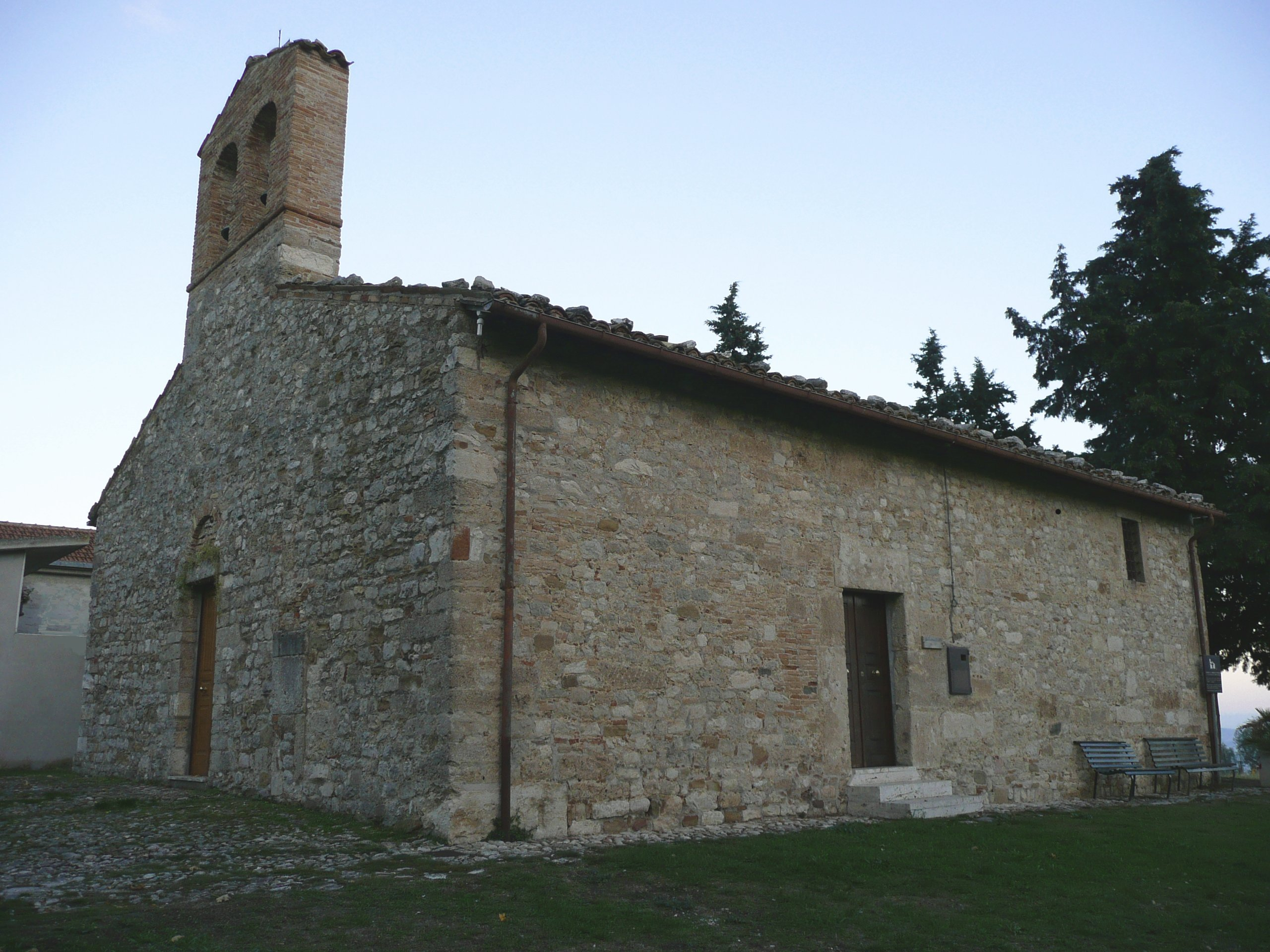 Chiesa di S. Maria de Praediis, in Pantaneto e Castagneto, frazioni di Teramo, Italy